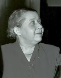 Kjerstin Göransson-Ljungman (1901-1971), svensk arkitekt, konstnär och författare.